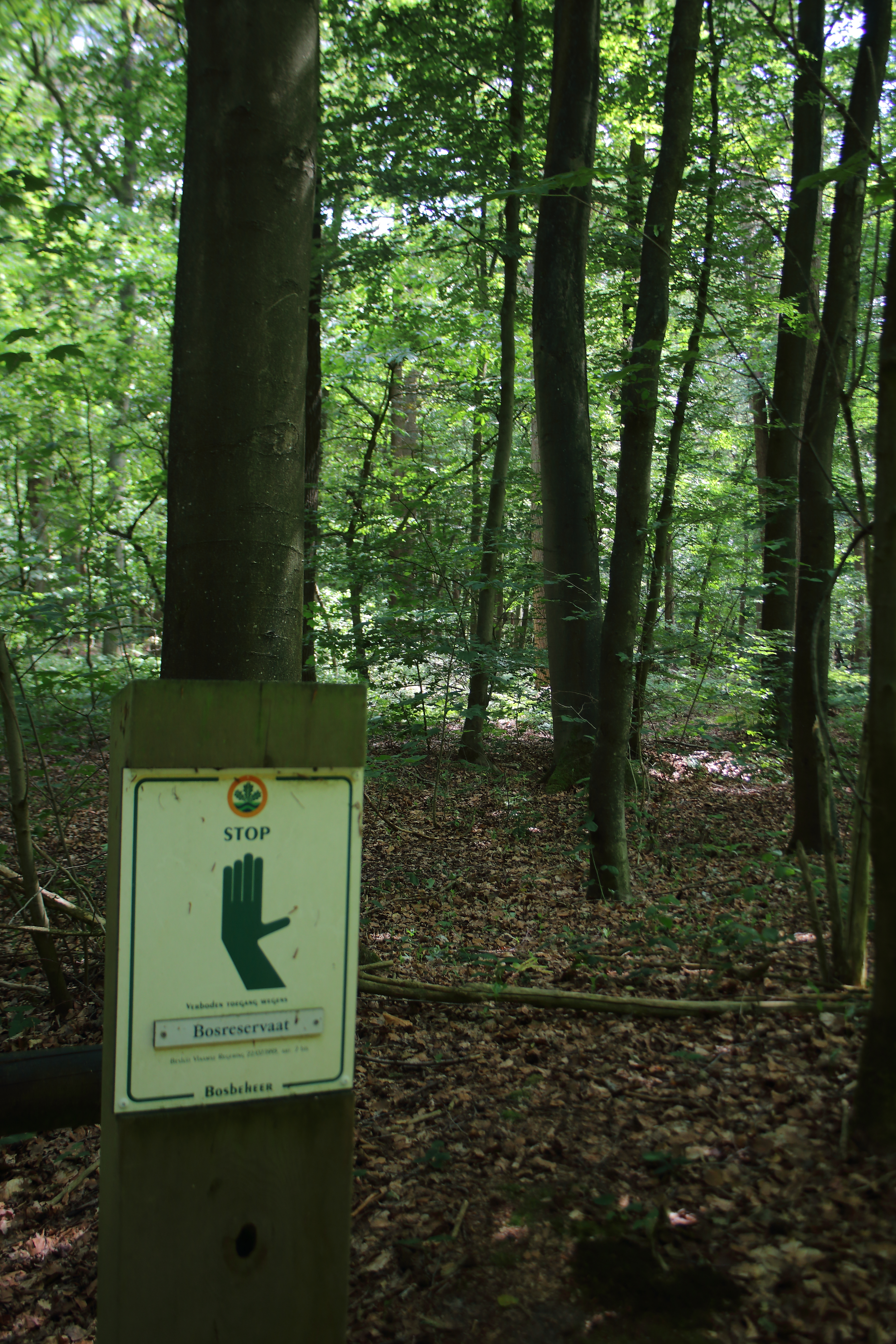 Bellebargiebos, Lievegem, Vlaanderen, België